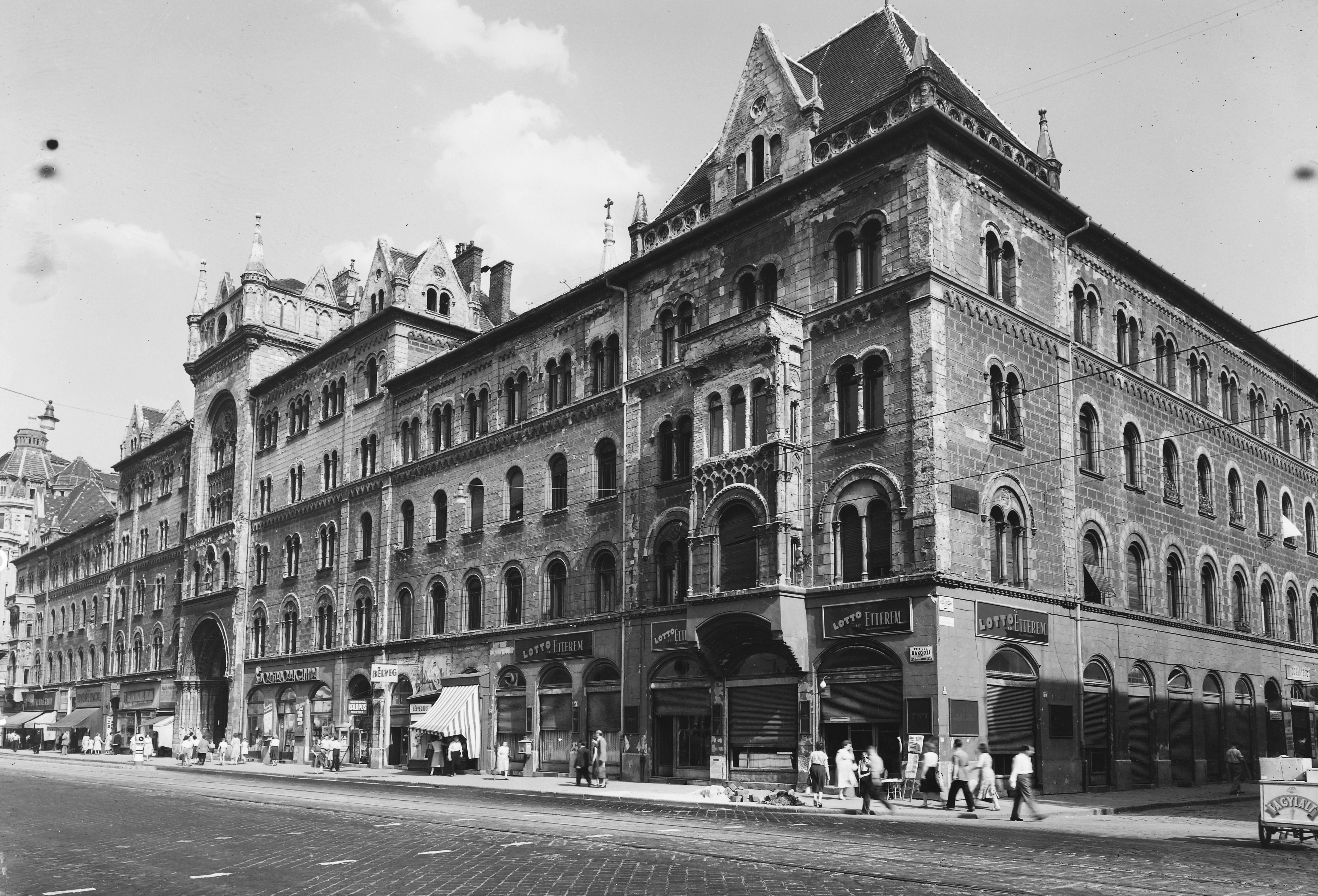 Rákóczi út, jobbra a Kiss József utca. Location: Hungary, Budapest VIII. Tags: restaurant, ice cream, Budapest, street view, genre painting, pedestrian, sign-board, stamp, sunshades, safety island, csibi lamp, cobblestones Title: Rákóczi út, jobbra a Kiss József utca.